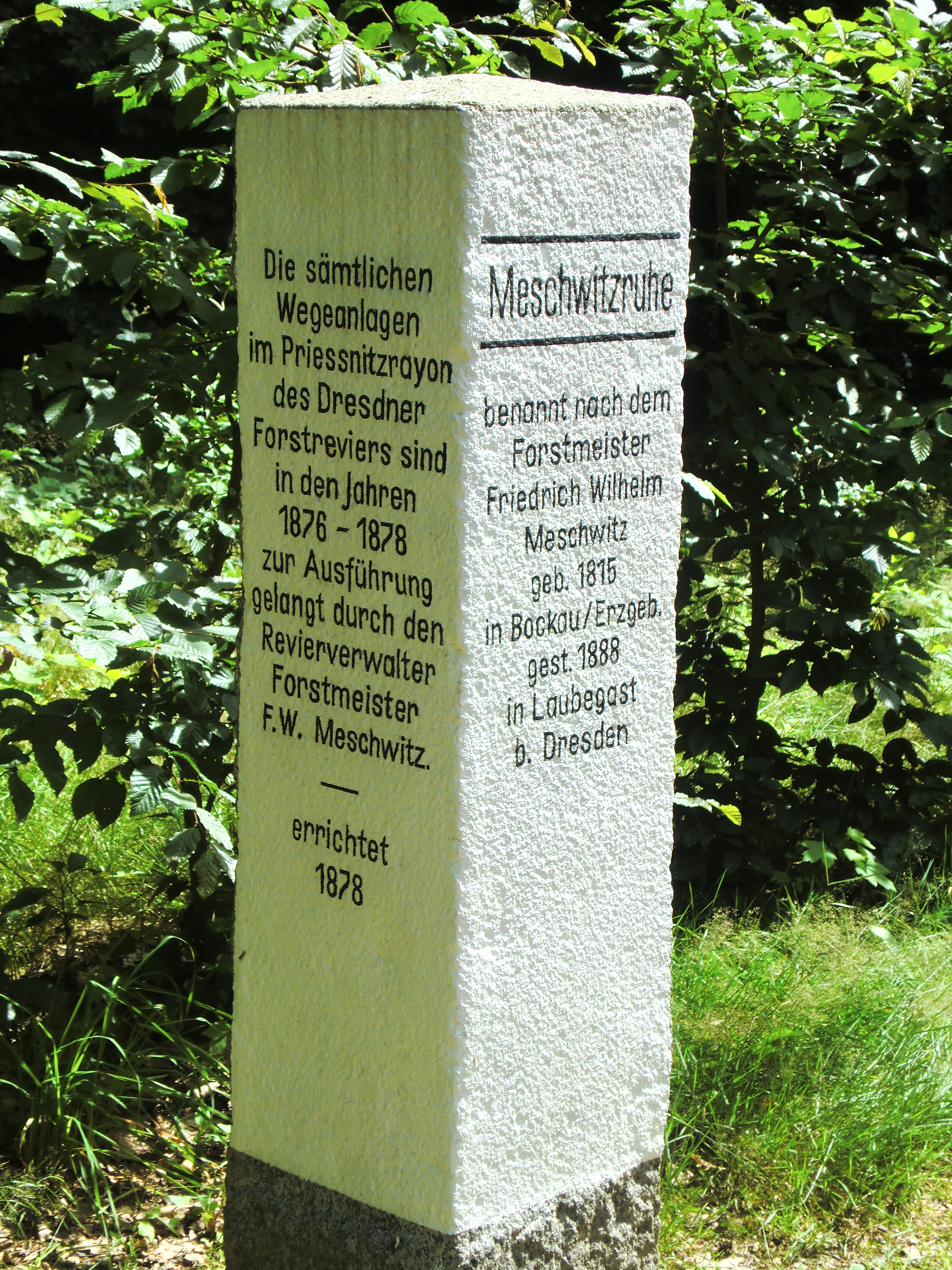 Dresdner Heide-Meschwitzruhe 2016